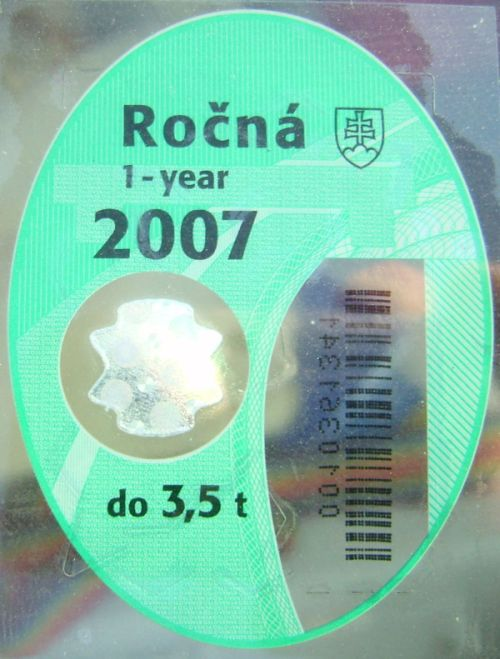 Vignette Slovakia 2007 - Slowakei - road tax